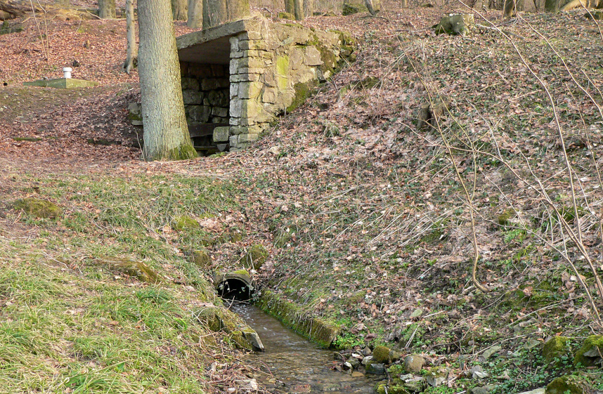 Haller Quelle